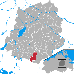 Rosenow, Landkreis Demmin, Mecklenburg-Vorpommern